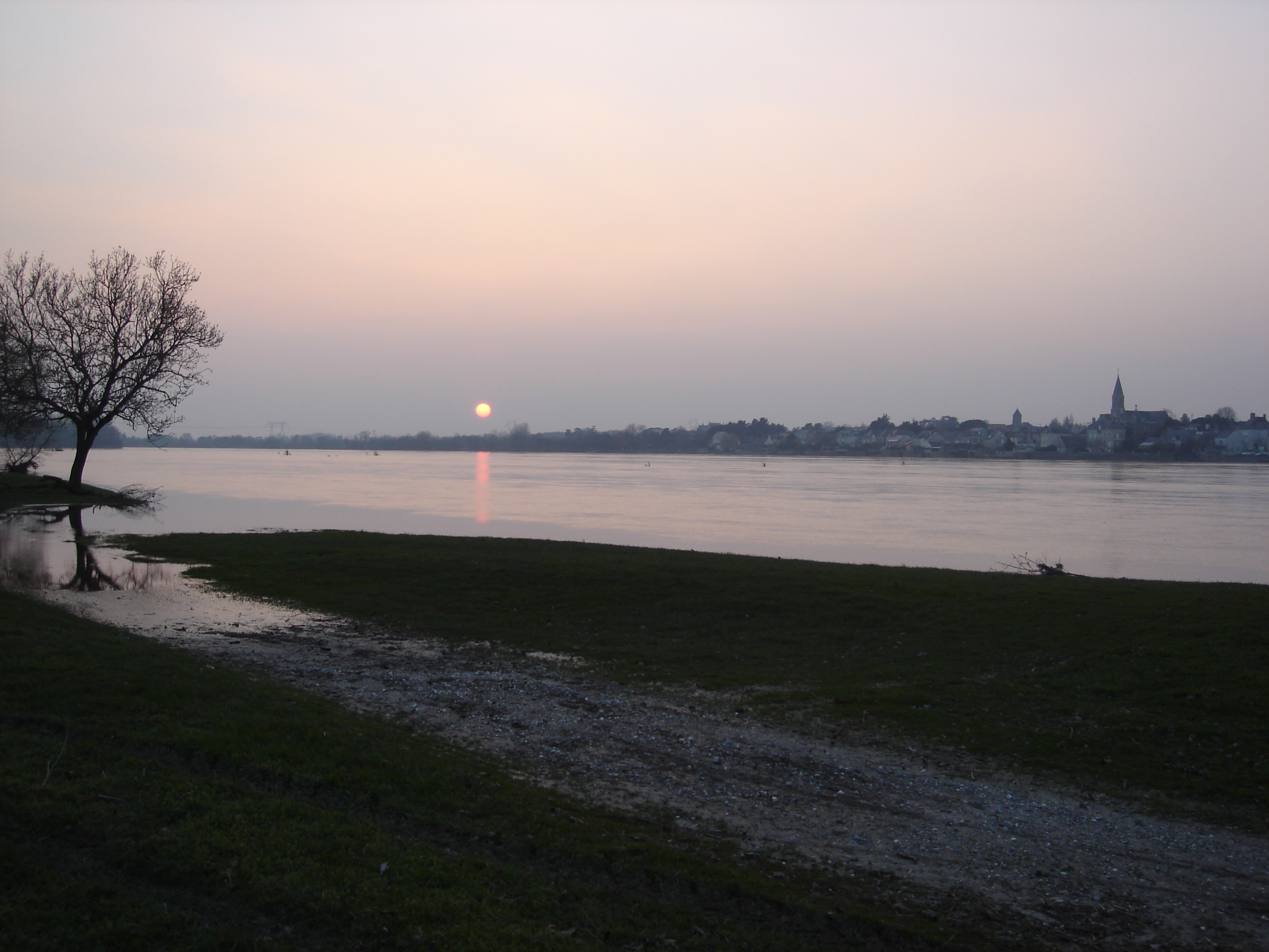 Catégorie:Image de Wikipédia Le Fresne sur Loire, vu de la rive sud de la Loire, pendant la crue.